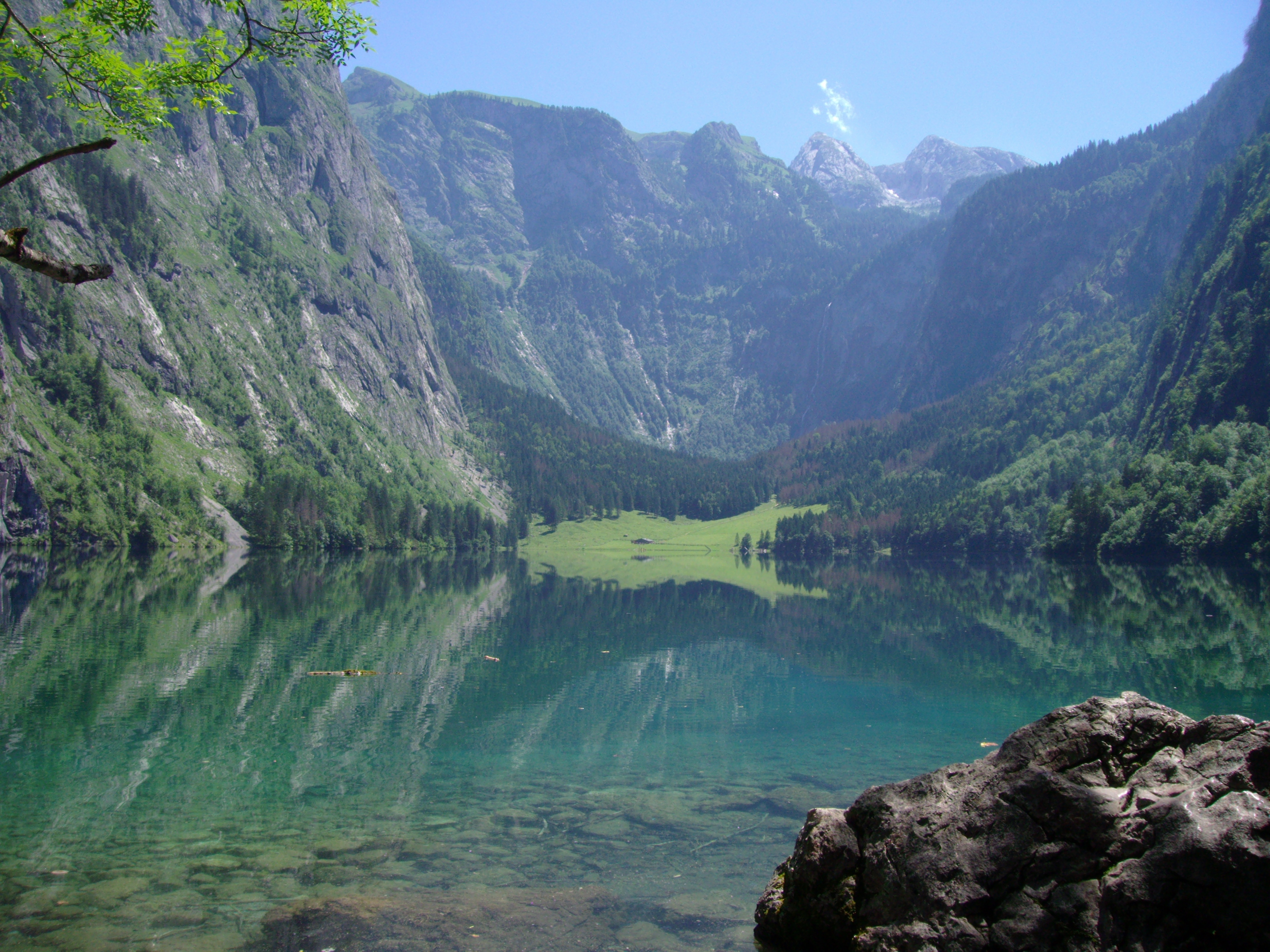 Blick auf den Obersee im Nationalpark Berchtesgadener Land.